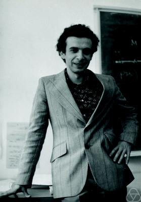 Foto di Vitali Milman